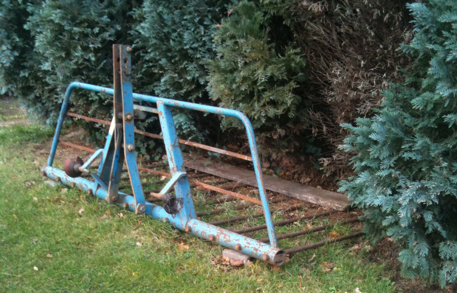 Rübenblattgabel (auch Siloschwanz) zum Rübenblätter einsammeln